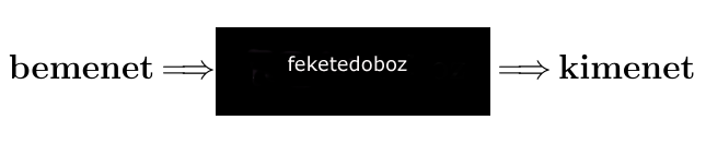 Fekete doboz sémája